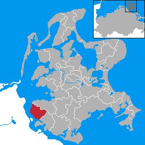 Altefähr, Landkreis Rügen, Mecklenburg-Vorpommern